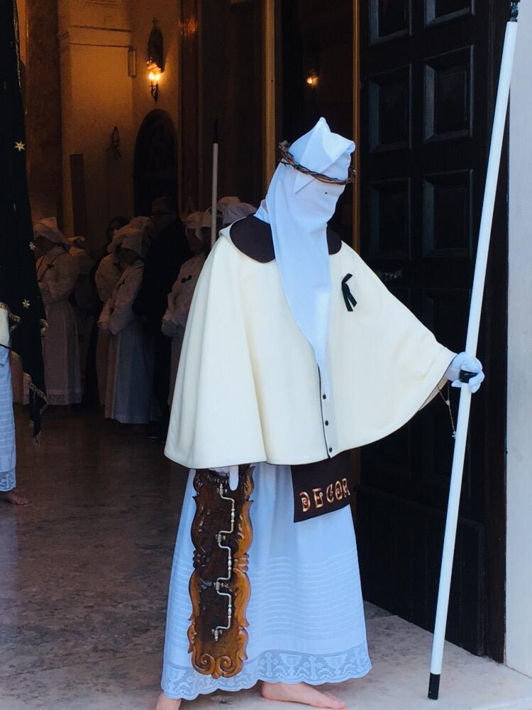 Troccolante 2019